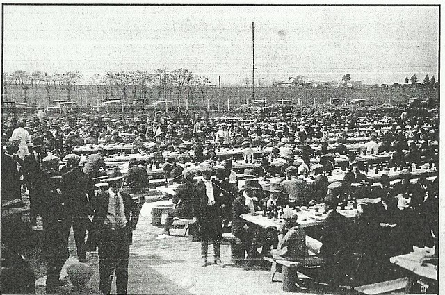 Festejos populares en la ciudad de Libertad, Merlo, 1929, Provincia de Buenos Aires.